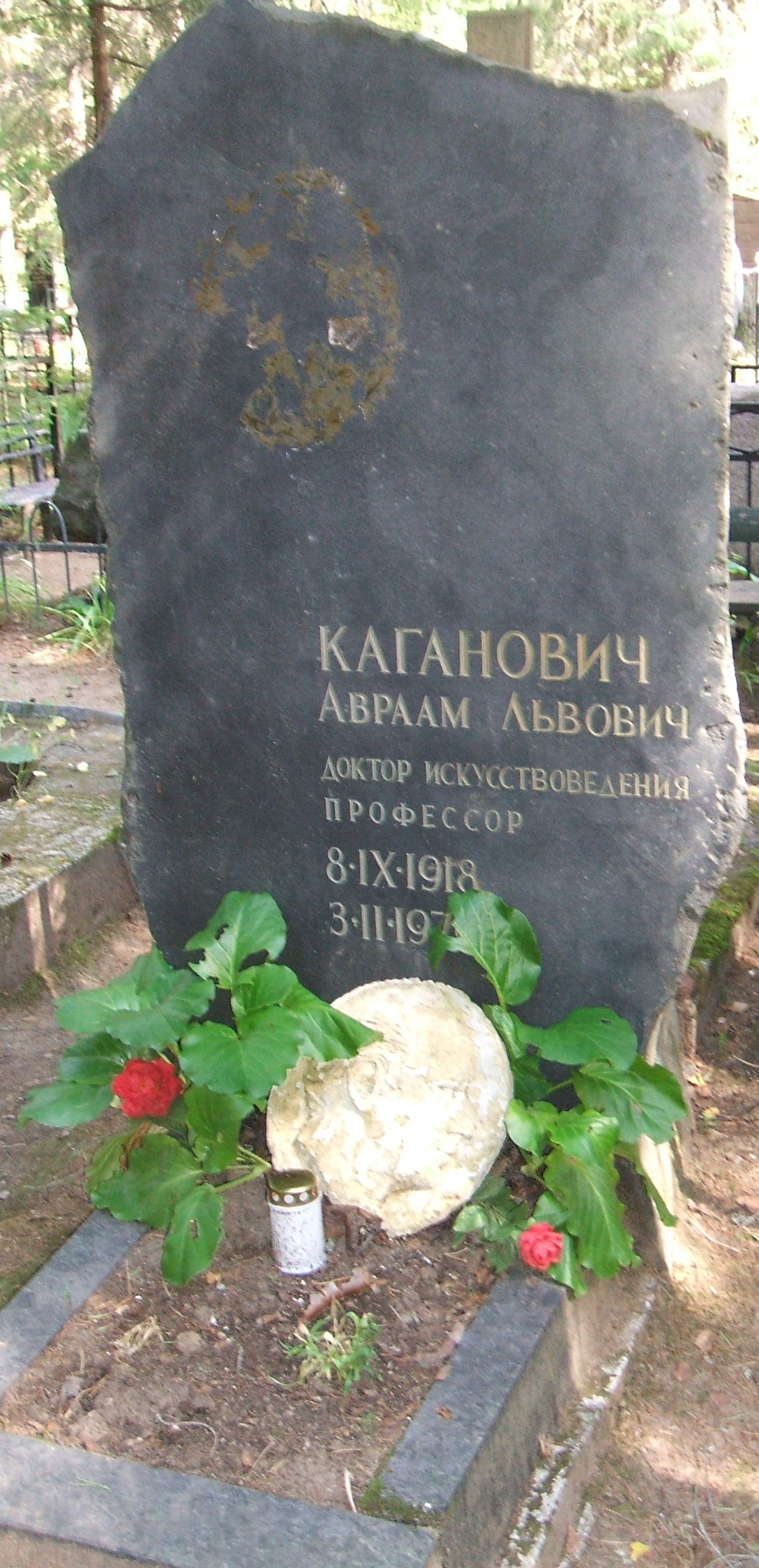 Комаровское кладбище Деятели культуры и науки